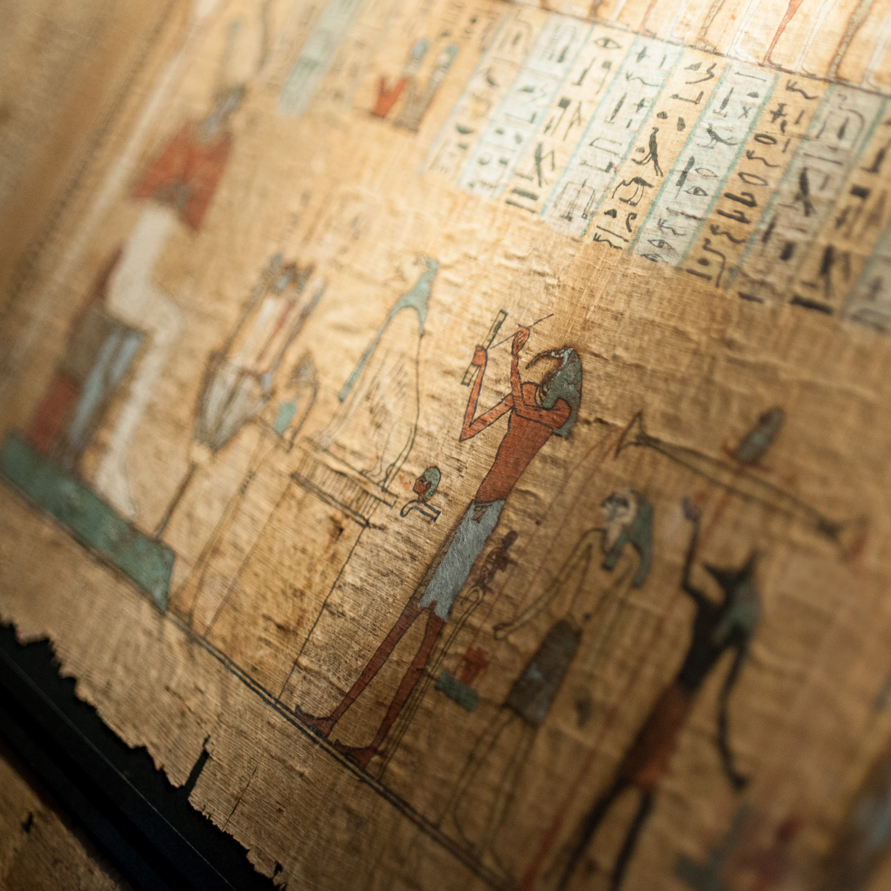 Le Livre des Morts d’Ousirour. Papyrus, Thèbes, Egypte. Ier s. av. J.-C. – IIe s. Restauré et conservé à la Fondation Martin Bodmer. Photo Naomi Wenger.